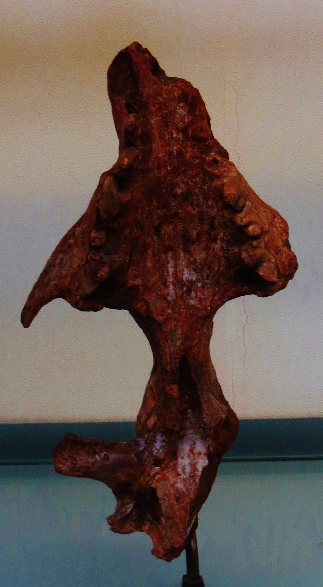 Fossil of Pterodon, an extinct mammal - Took the photo at Musee d'Histoire Naturelle, Paris